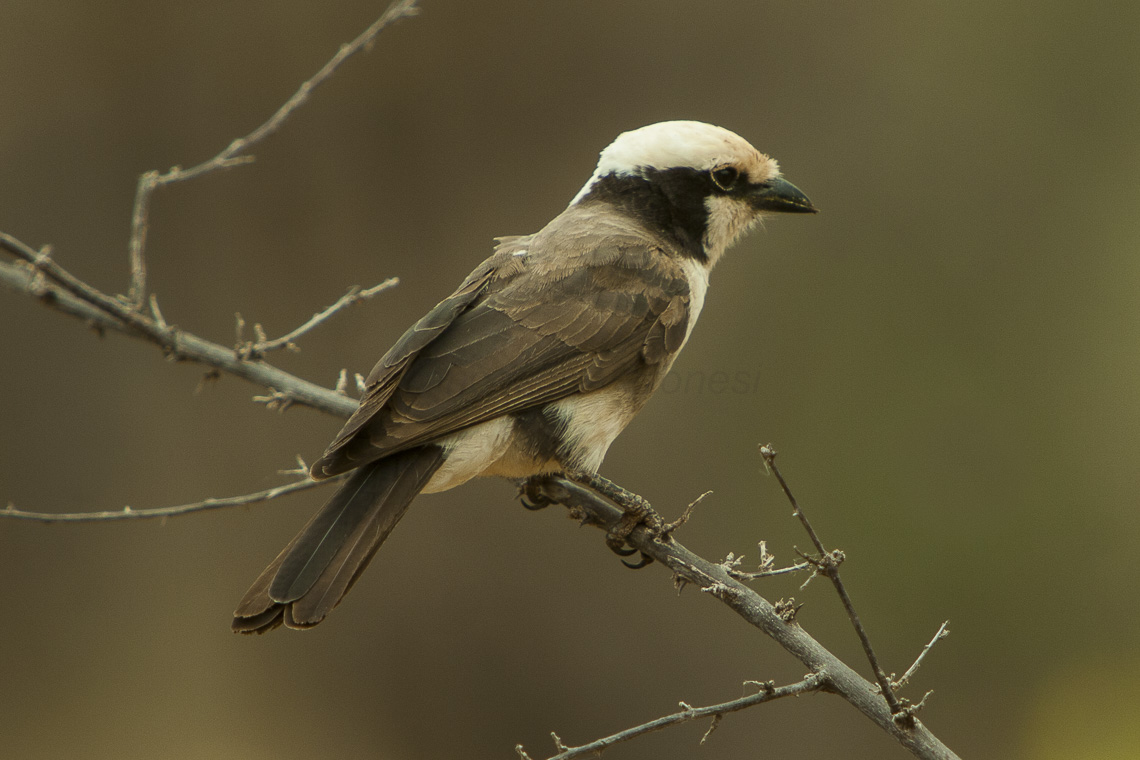 Eurocéphale de Rüppell (Eurocephalus ruppelli) - Photo prise au Kenya